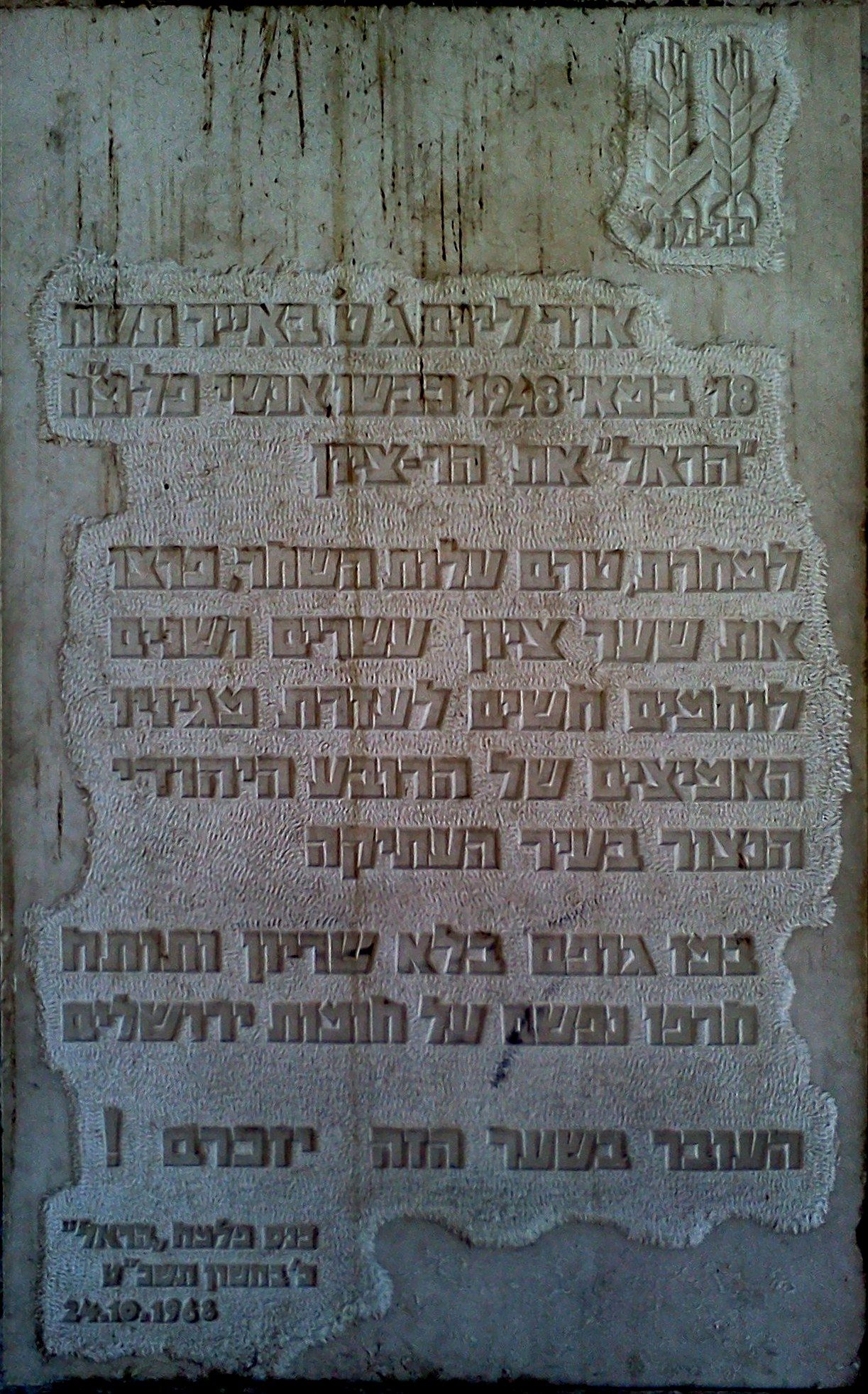 שלט הנצחה ללוחמי חטיבת הראל של הפלמ"ח, בשער ציון Memorial sign on Zion Gate